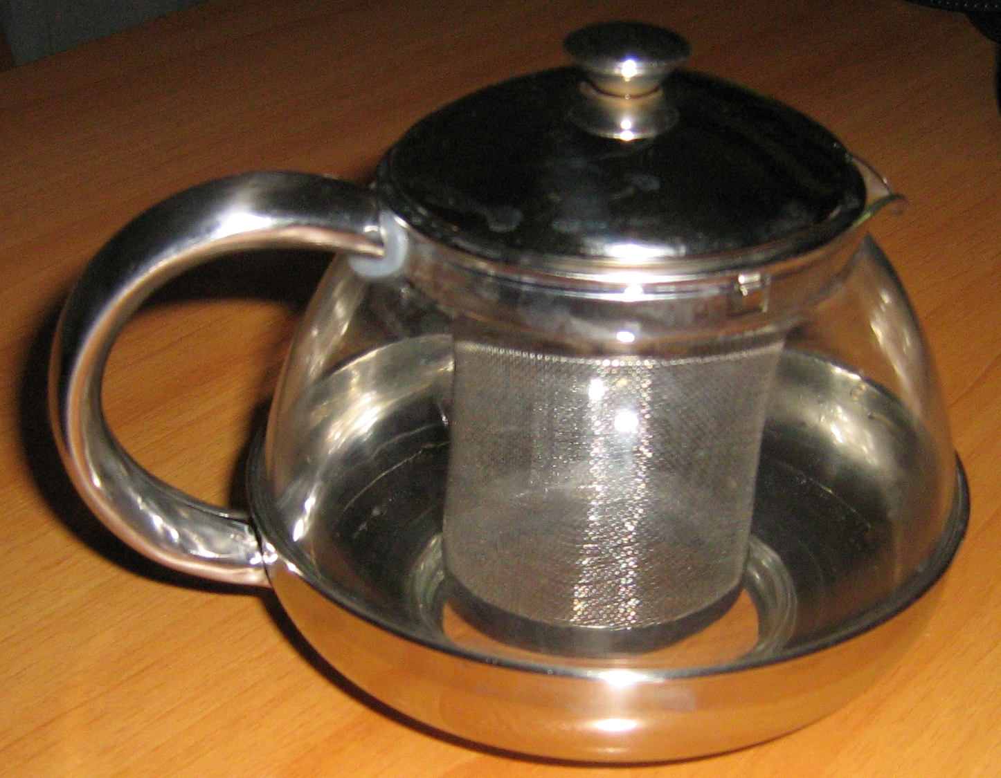 Teiera con infusore interno, sono l'autore della fotografia.